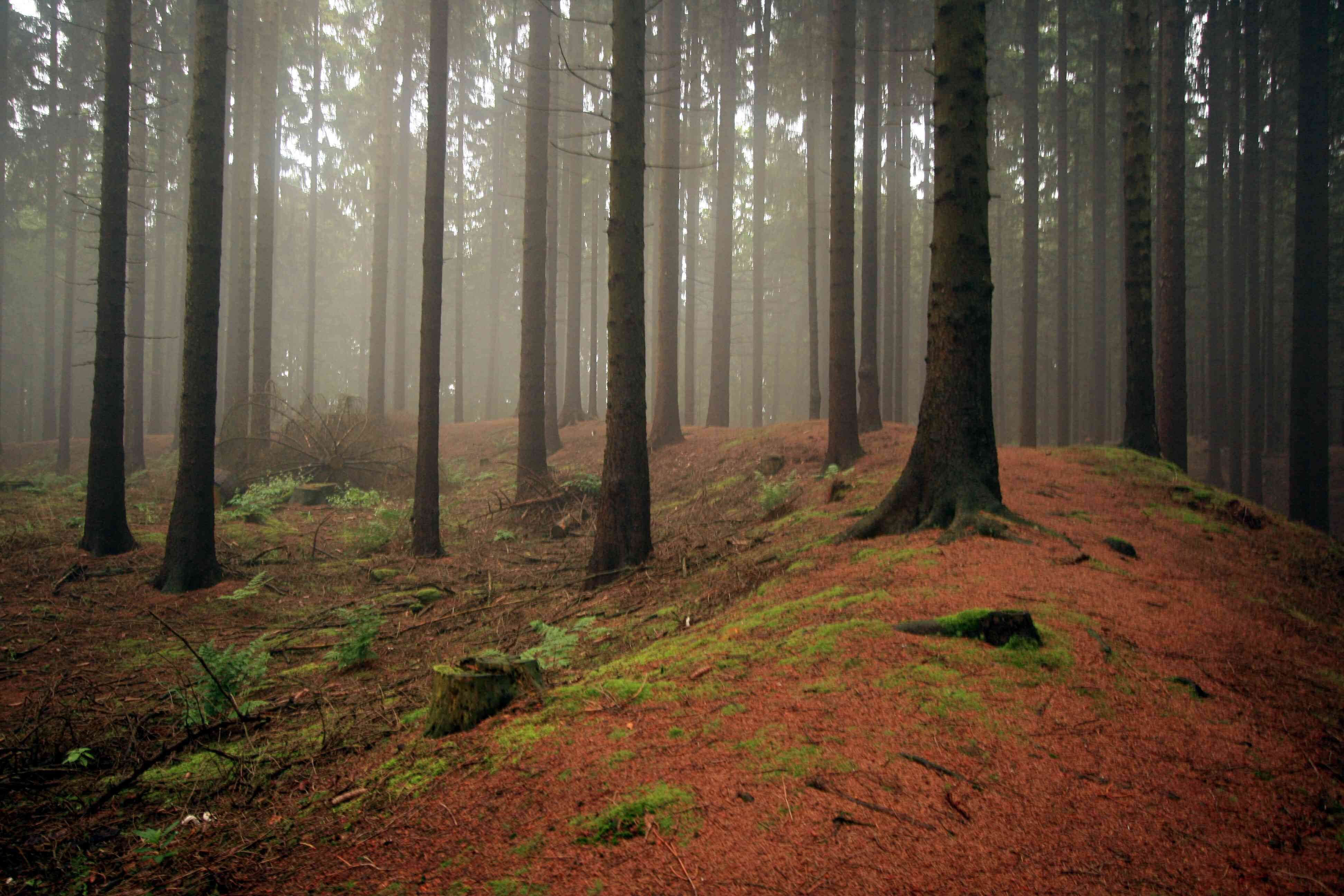 Wallburg auf dem Loermund bei Sichtigvor